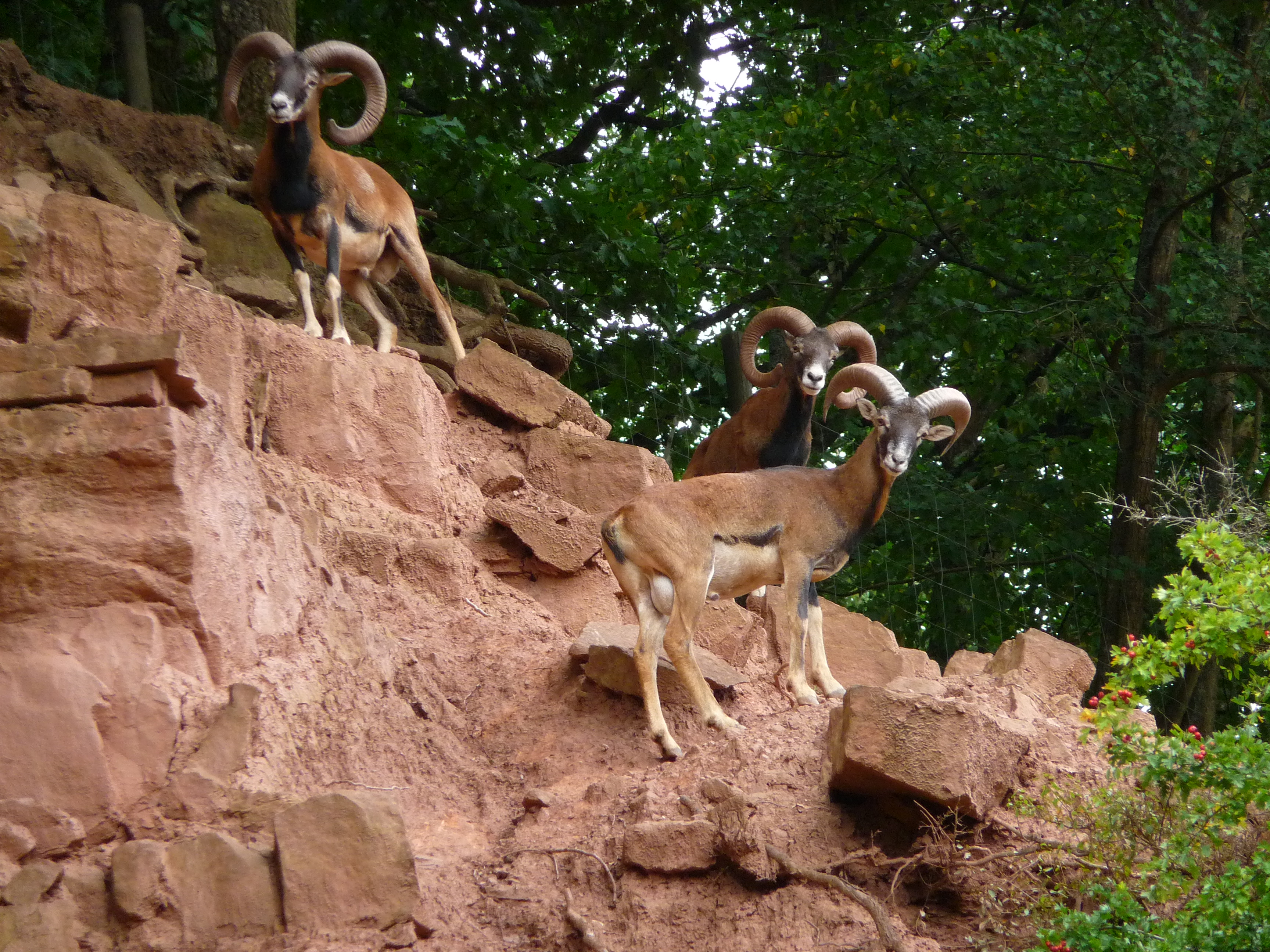 Mufflons im Eifelpark Gondorf (Rheinland-Pfalz, Deutschland)